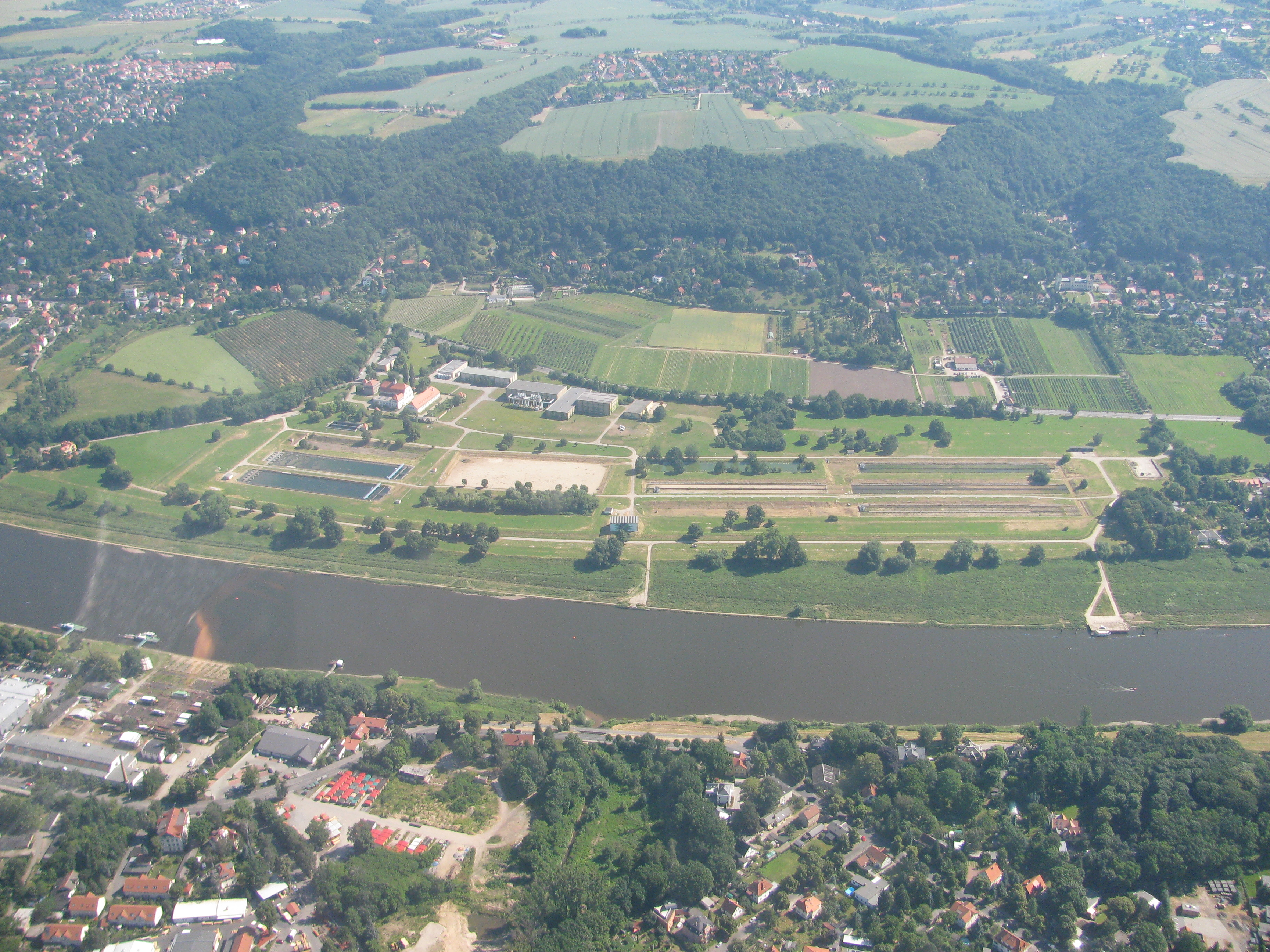 Luftbild Wasserwerk Hosterwitz, Rockau, Dresden